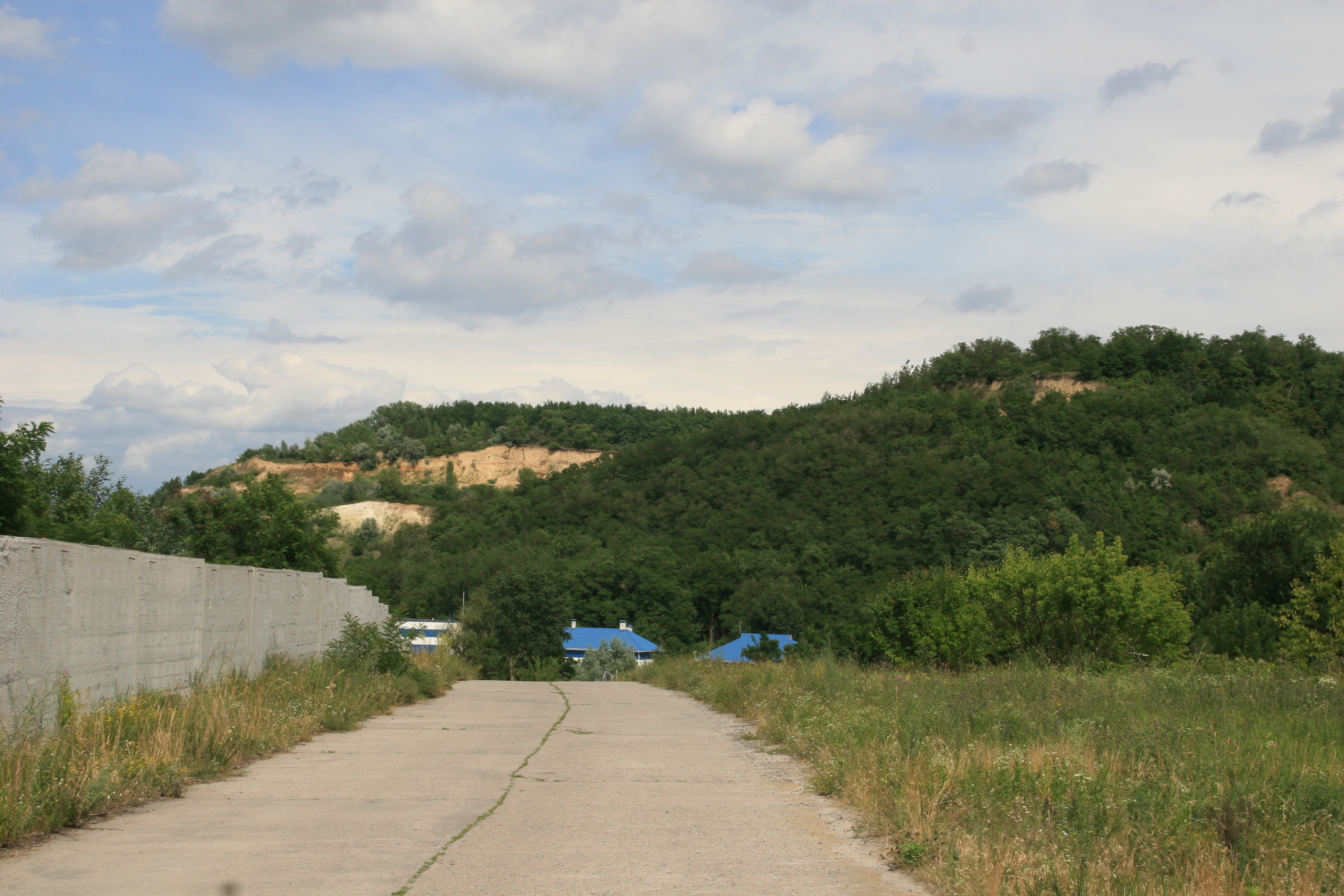 Вулиця Шевченка в селі Халеп'я Обухівського району Київської області, Україна